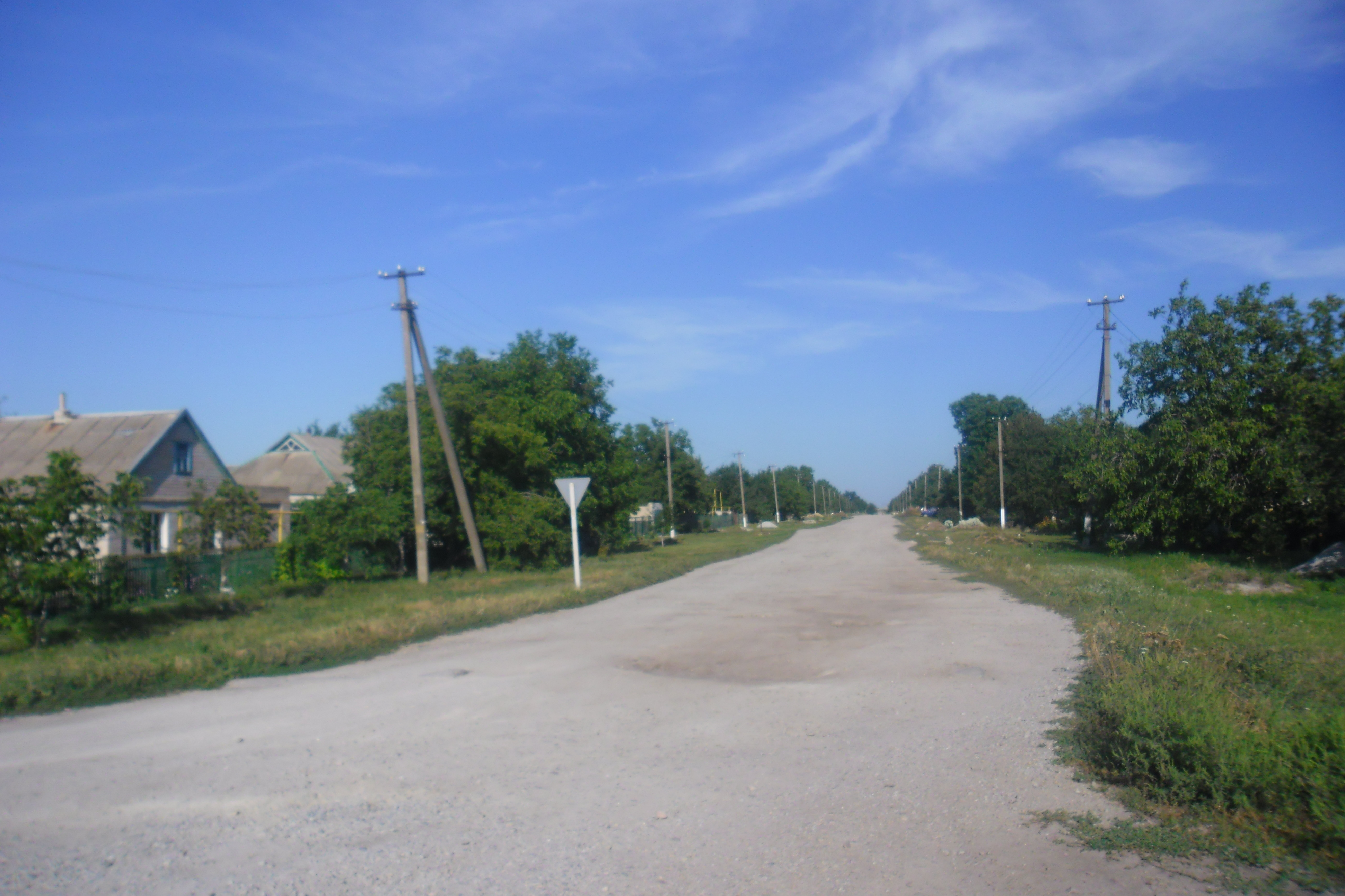 Фото